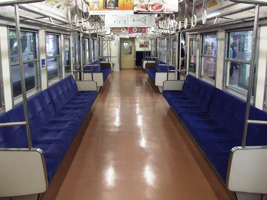 クハ411-607の車内 小倉駅にて撮影